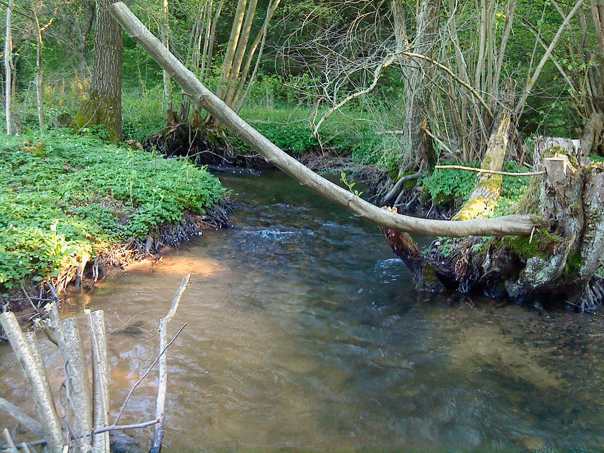 Die Speckkahl südöstlich von Sommerkahl beim Gehöft Haidberg